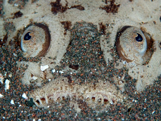 メガネウオ Uranoscopus bicinctus